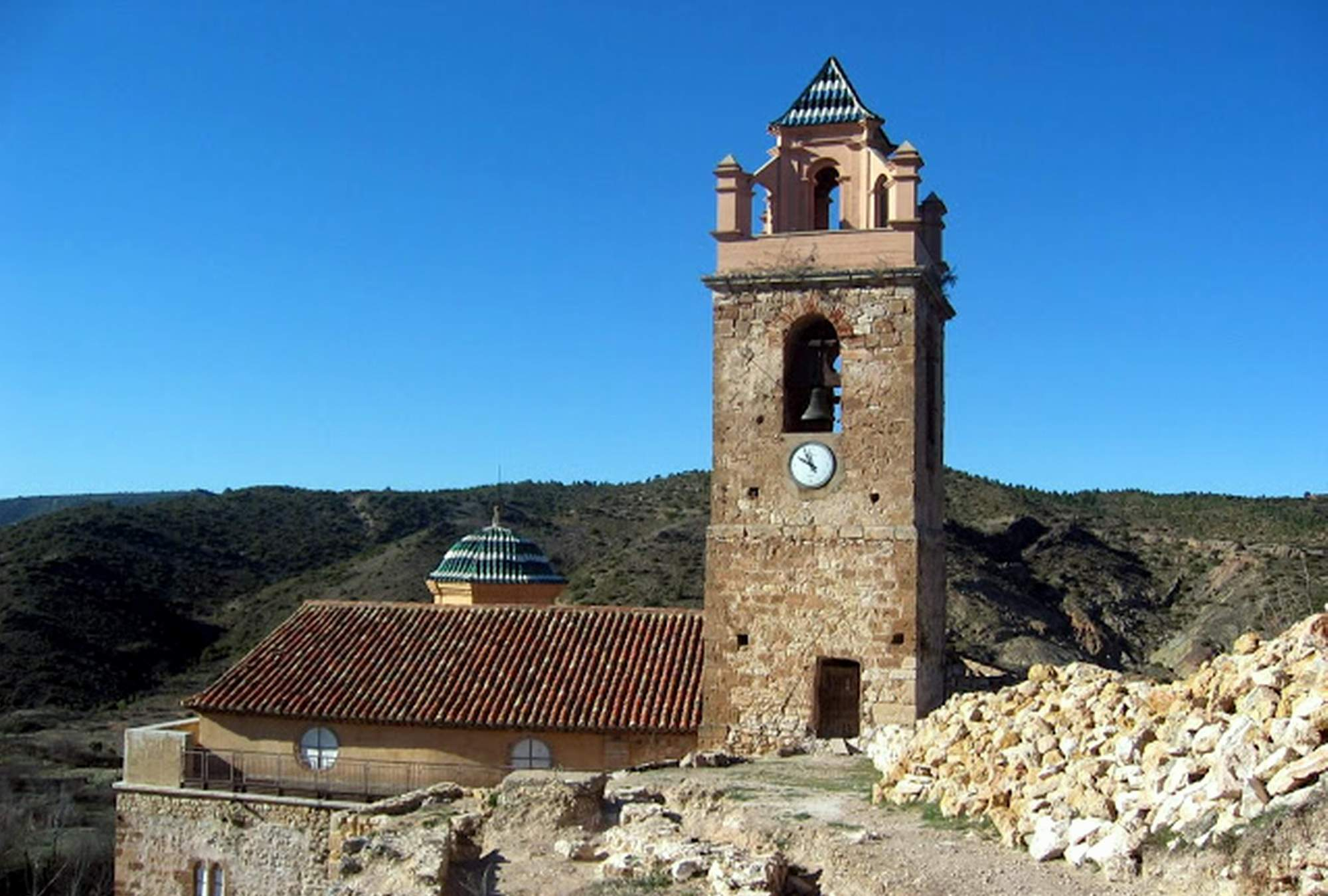 El campanario es una estructura exenta, ubicada en el solar del castillo, a la cabecera del templo, lado de la epístola y forma parte del conjunto monumental de la Iglesia-fortaleza de Castielfabib (Valencia).